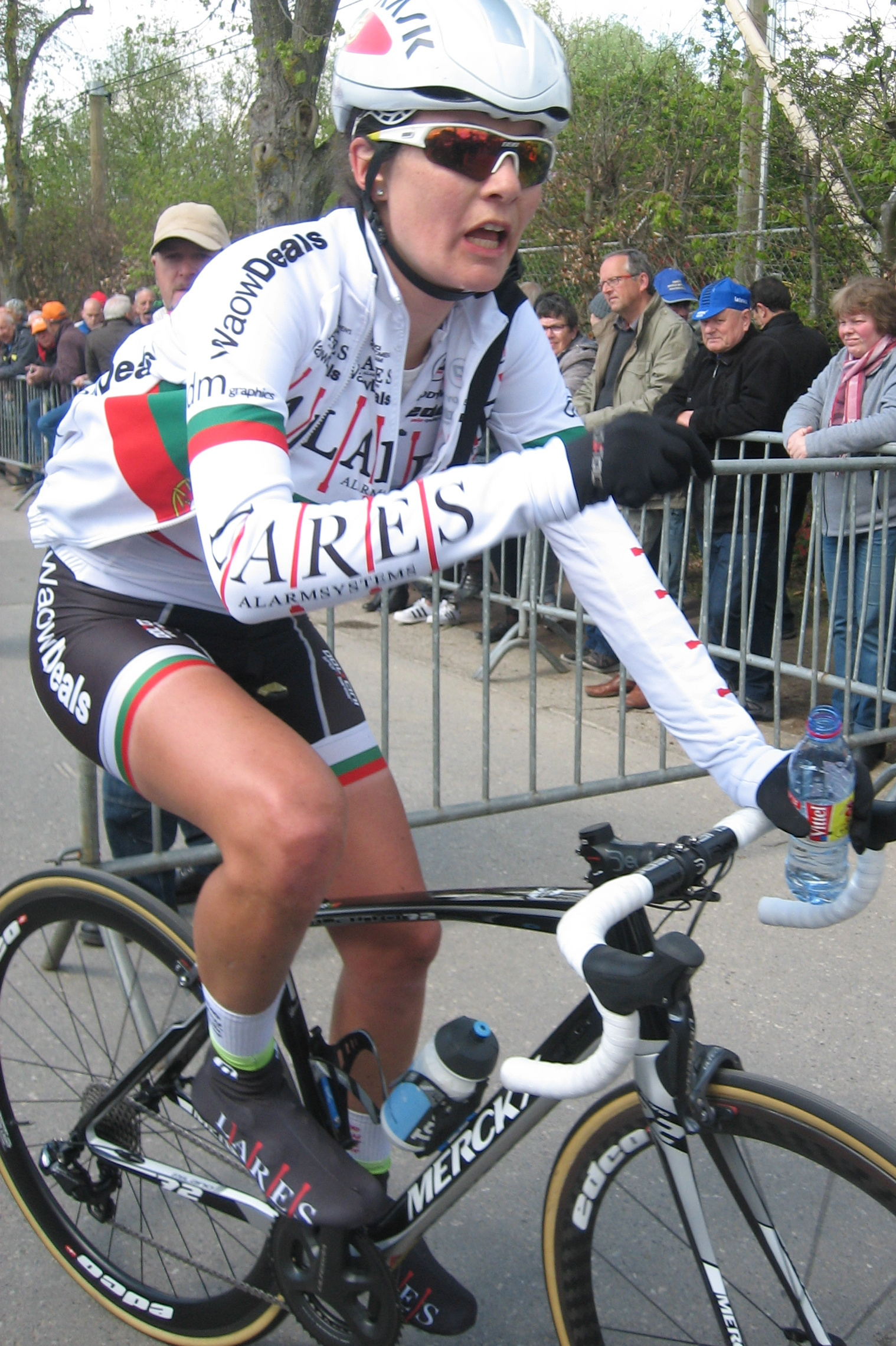 Finish van de Waalse Pijl 2017 in Huy.